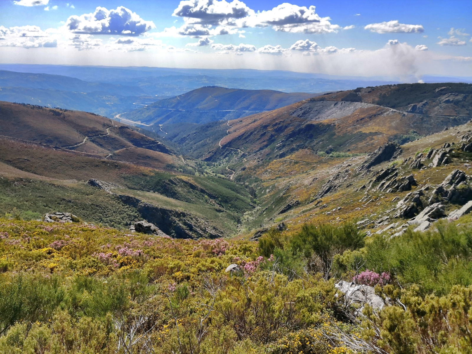 Serra do Marão em Maio de 2018